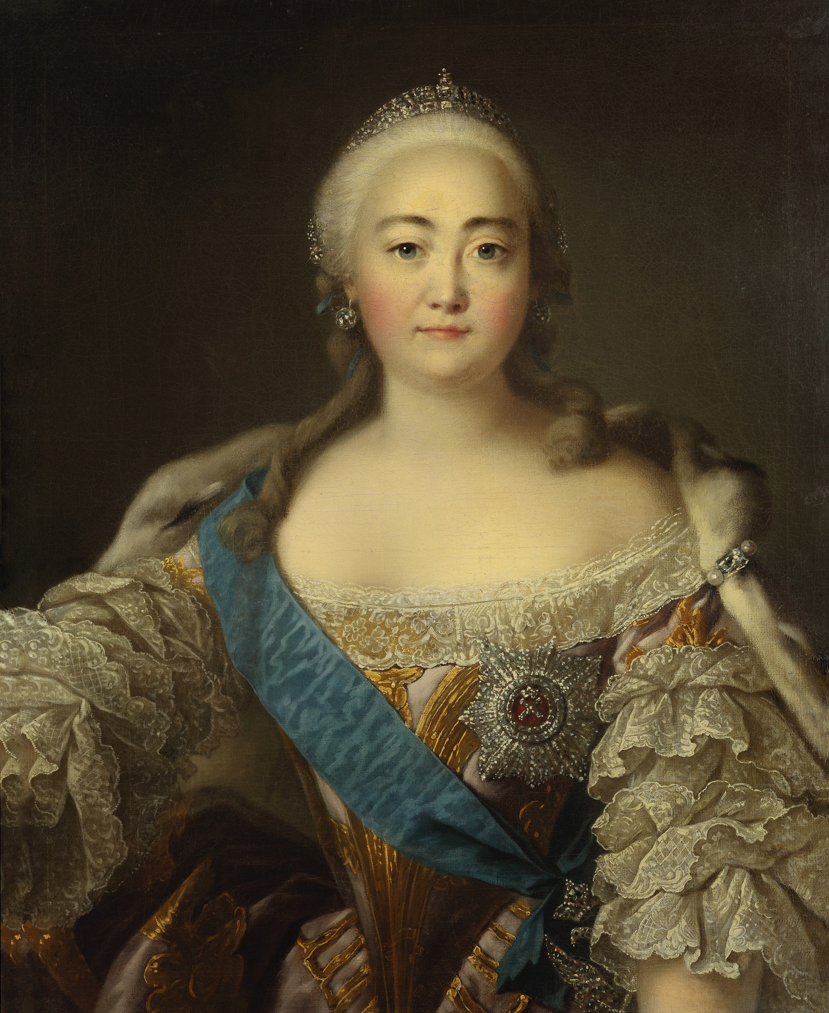 Л. Токе. Авторство под вопросом. Портрет императрицы Елизаветы Петровны. Холст, масло. 81х66. Поступила в 1927 г. из Государственного музейного фонда (собрание Архива Министерства иностранных дел; дар князя М. А. Оболенского). Произведение записано в инвентарной книге Государственной Третьяковской галереи под номером 9344. Французский живописец Луи Токе (Токке), придворный художник, представитель стиля рококо, был приглашен в Россию графом М.И.Воронцовым специально для написания большого парадного портрета императрицы Елизаветы Петровны (в настоящее время хранится в Государственном Эрмитаже). За те полтора года, что Токе пробыл в Санкт-Петербурге, художник выполнил несколько изображений императрицы, которые пользовались успехом и широкой известностью. Копии парадного портрета императрицы, как в рост, так и его поясном варианте, неоднократно выполнялись другими живописцами, в том числе и известным крепостным художником графа П.Б.Шереметева Иваном Петровичем Аргуновым, а так же учащимися Императорской Академии художеств. Французский мастер подчеркнул красоту и очарование императрицы. Он запечатлел ее в пышном туалете, с горностаевой мантией, наброшенной на плечи, с лентой и звездой ордена Святого апостола Андрея Первозванного.